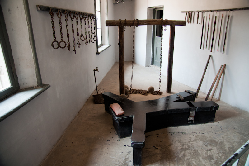 Folterraum im Konzentrationslager Lüshun